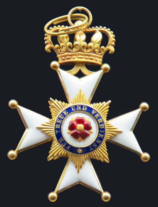 Lippischer Hausorden, Hausorden als Ehrenkreuz 1. Klasse (Großkreuz), ausgegeben 1890–1944; ausgestellt im Lippischen Landesmuseum, selbst fotografiert